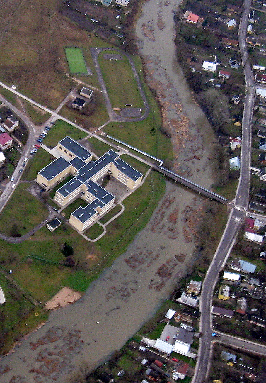 Lėvens upė Pasvalyje ir Lėvens mokykla